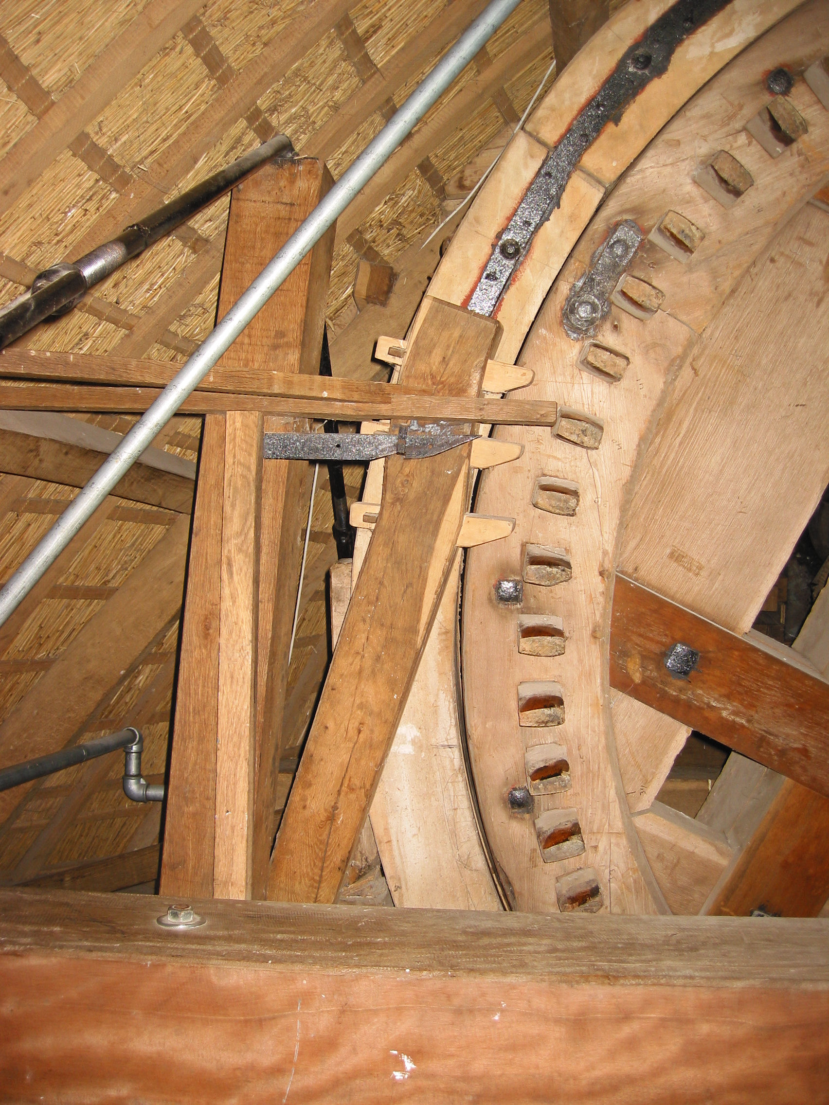 De Hoop in Garderen, Gelderland, the Netherlands